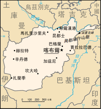 阿富汗地圖。